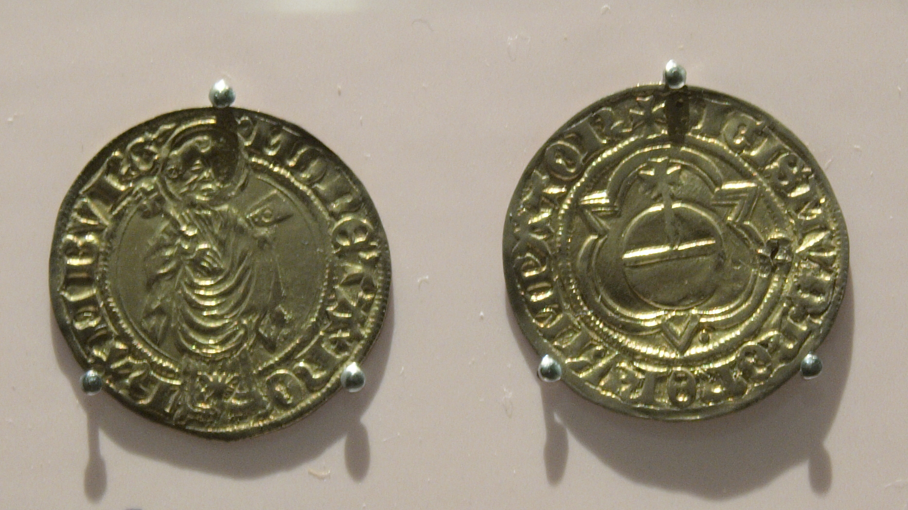 Hamburg Gulden 1435-1437. Photographed at Museum für Hamburgische Geschichte, Hamburg, Germany.